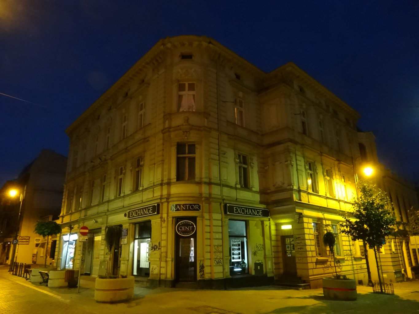 Kamienica przy ul. Dworcowej 39 w Bydgoszczy, róg ul. Marcinkowskiego